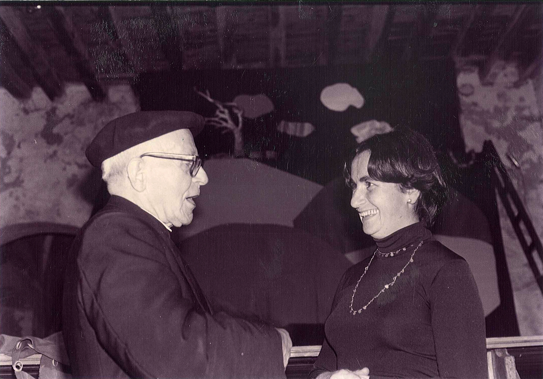 Enkarni Genua eta Jose Migel Barandiaran